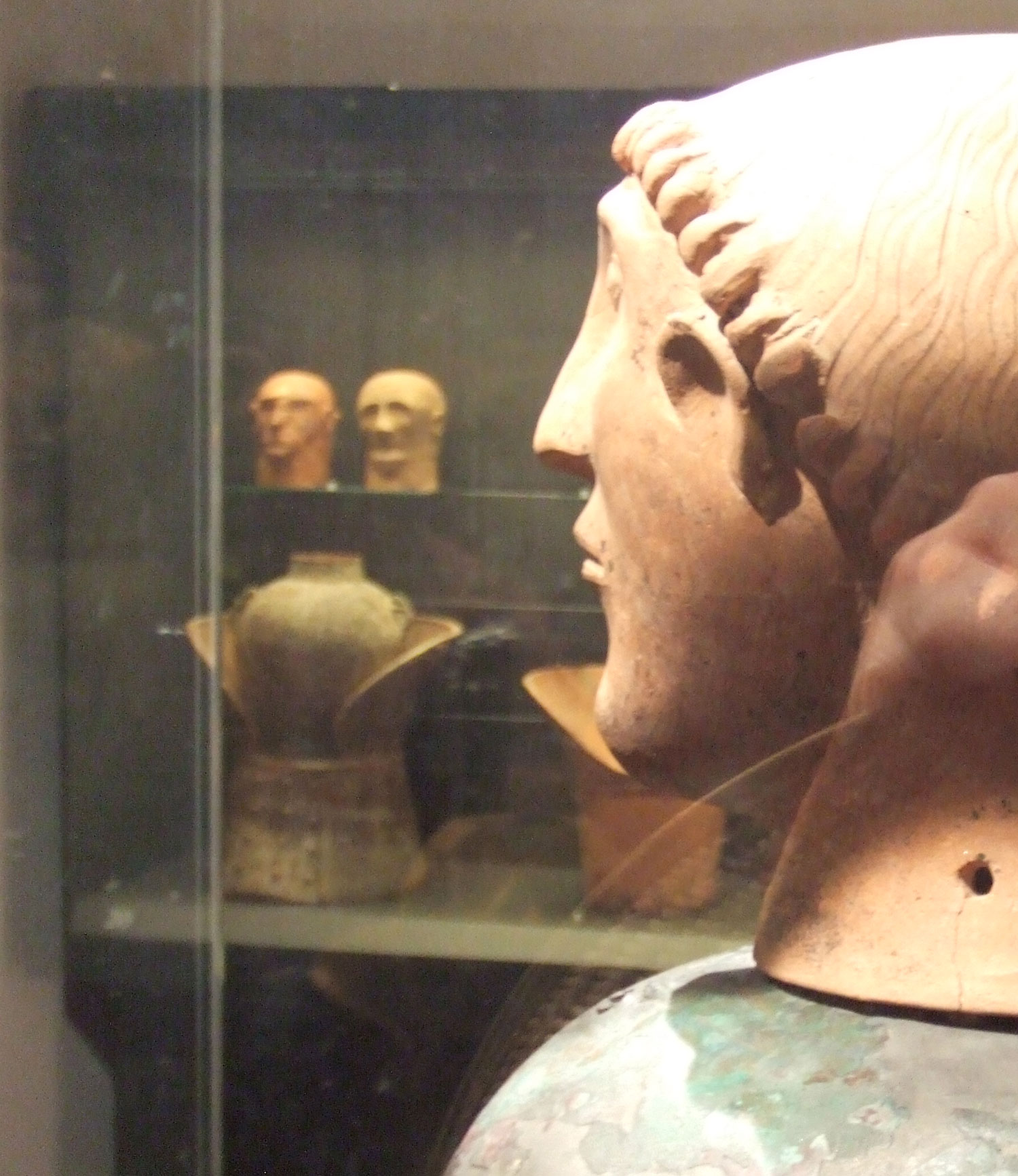 Canope de Chiusi - vitrines du Museo archeologico nazionale di Chiusi